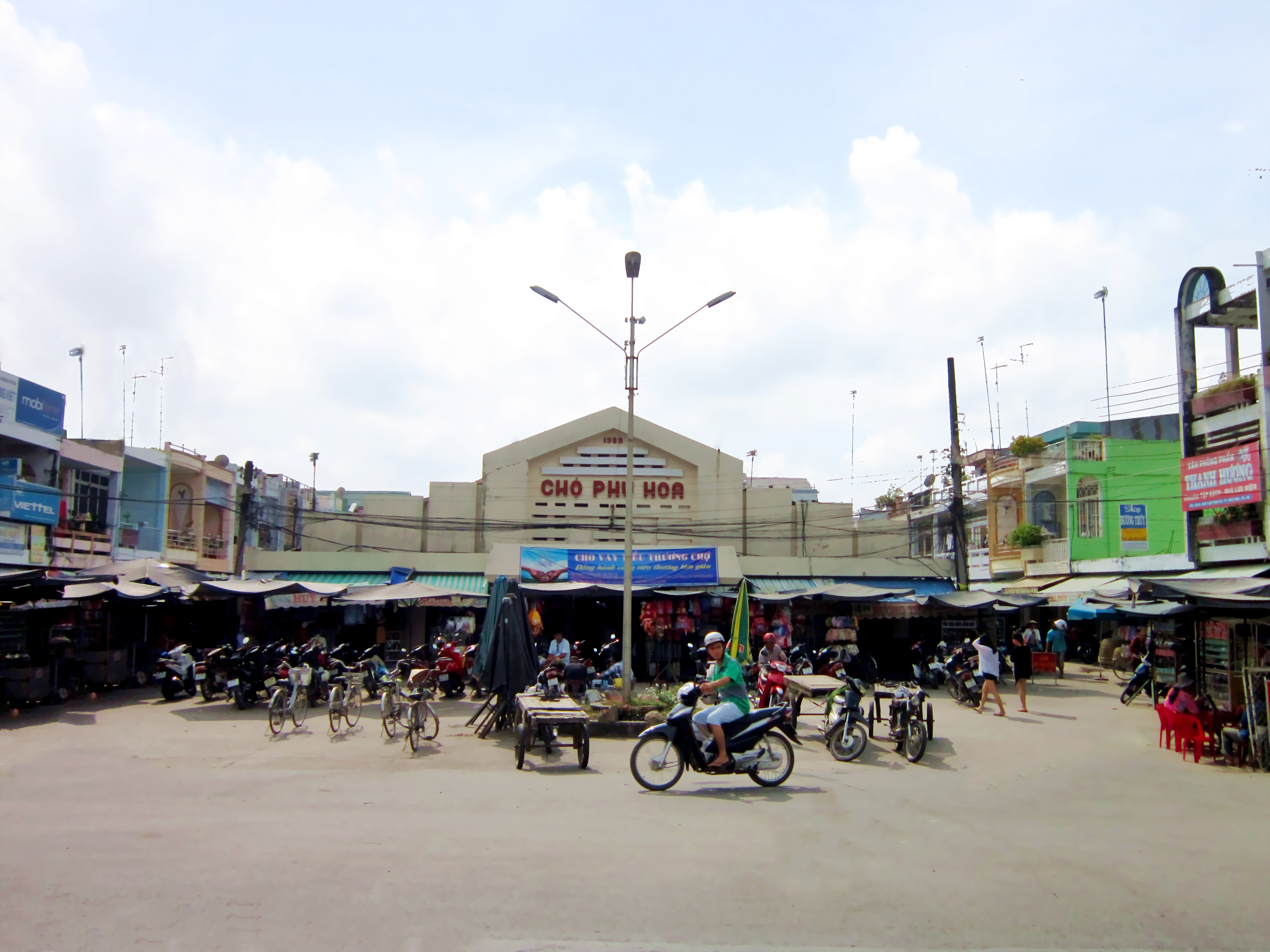 Chợ thị trấn Phú Hòa, thuộc huyện Thoại Sơn, tỉnh An Giang, Việt Nam.